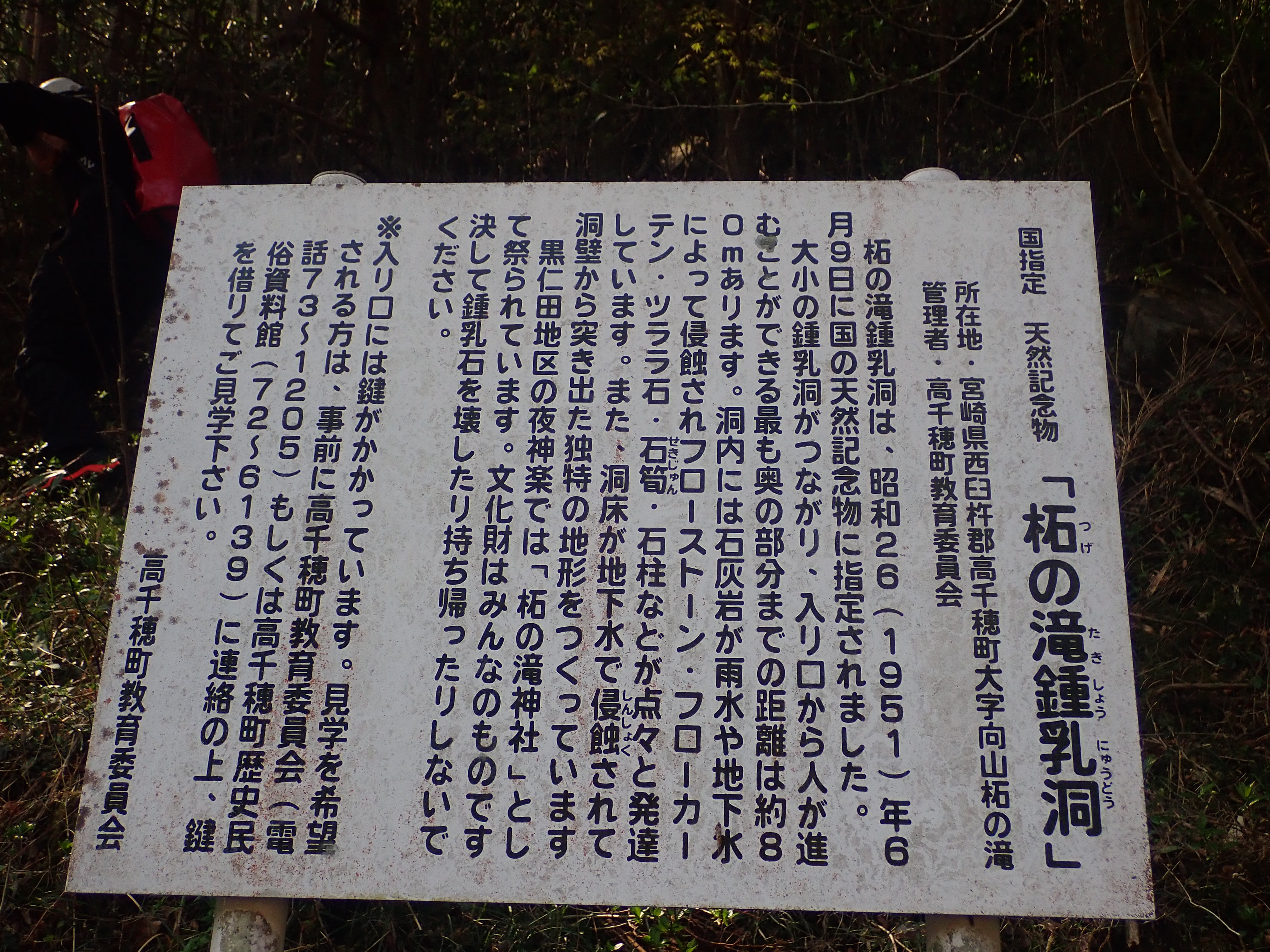 柘植の滝鍾乳洞の説明書き